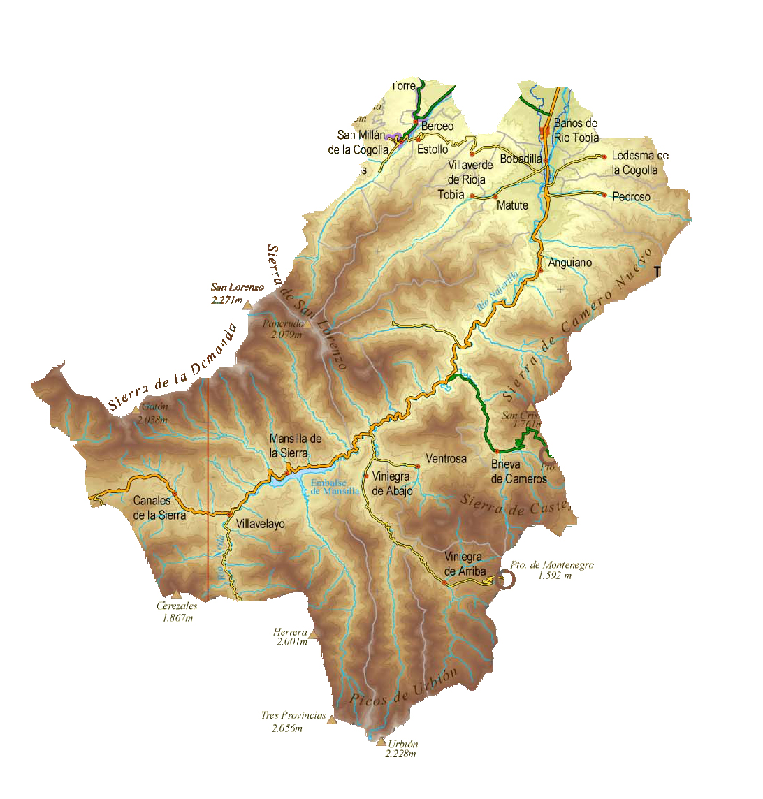 Mapa topográfico de la comarca de Anguiano